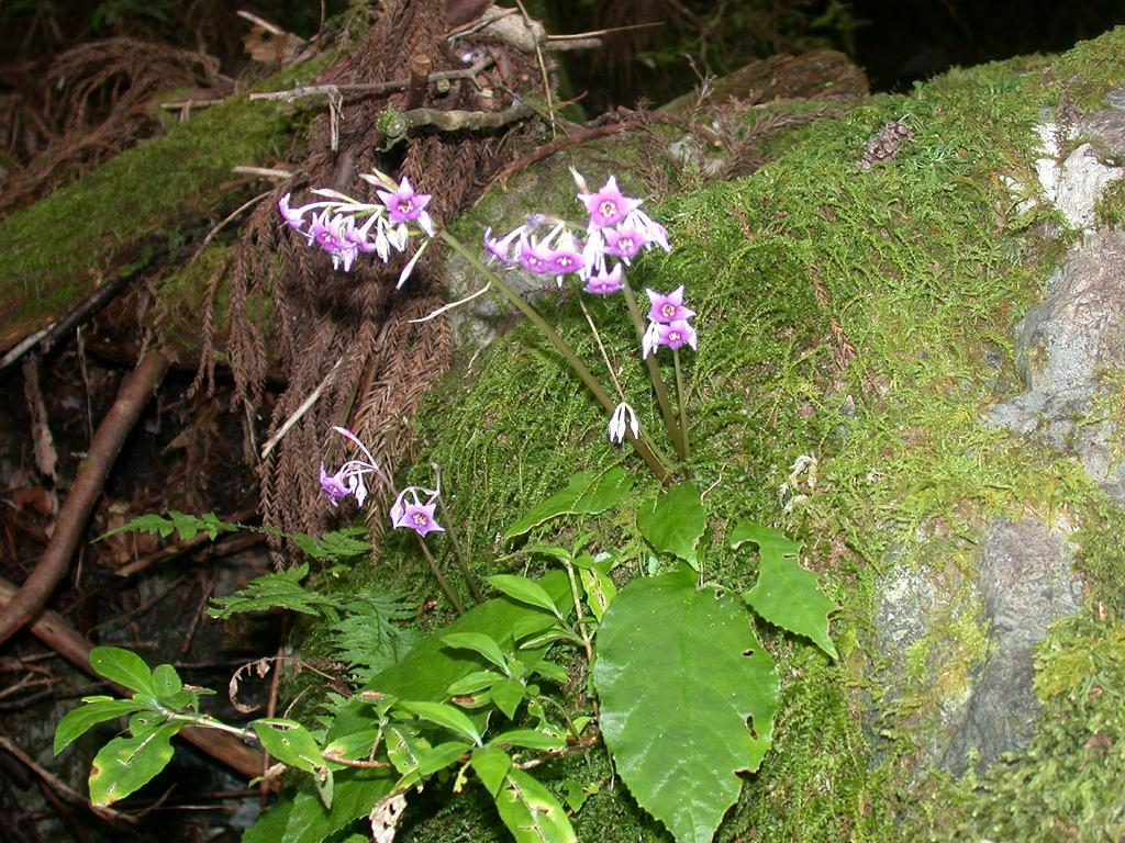 Conandron ramondioides ：イワタバコ 和歌山県田辺市北山:Locarity:kitayama Tanabe city, Wakayama pref. Japan 2004.08.04